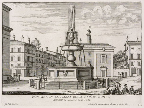 Engraving of Piazza dei Monti